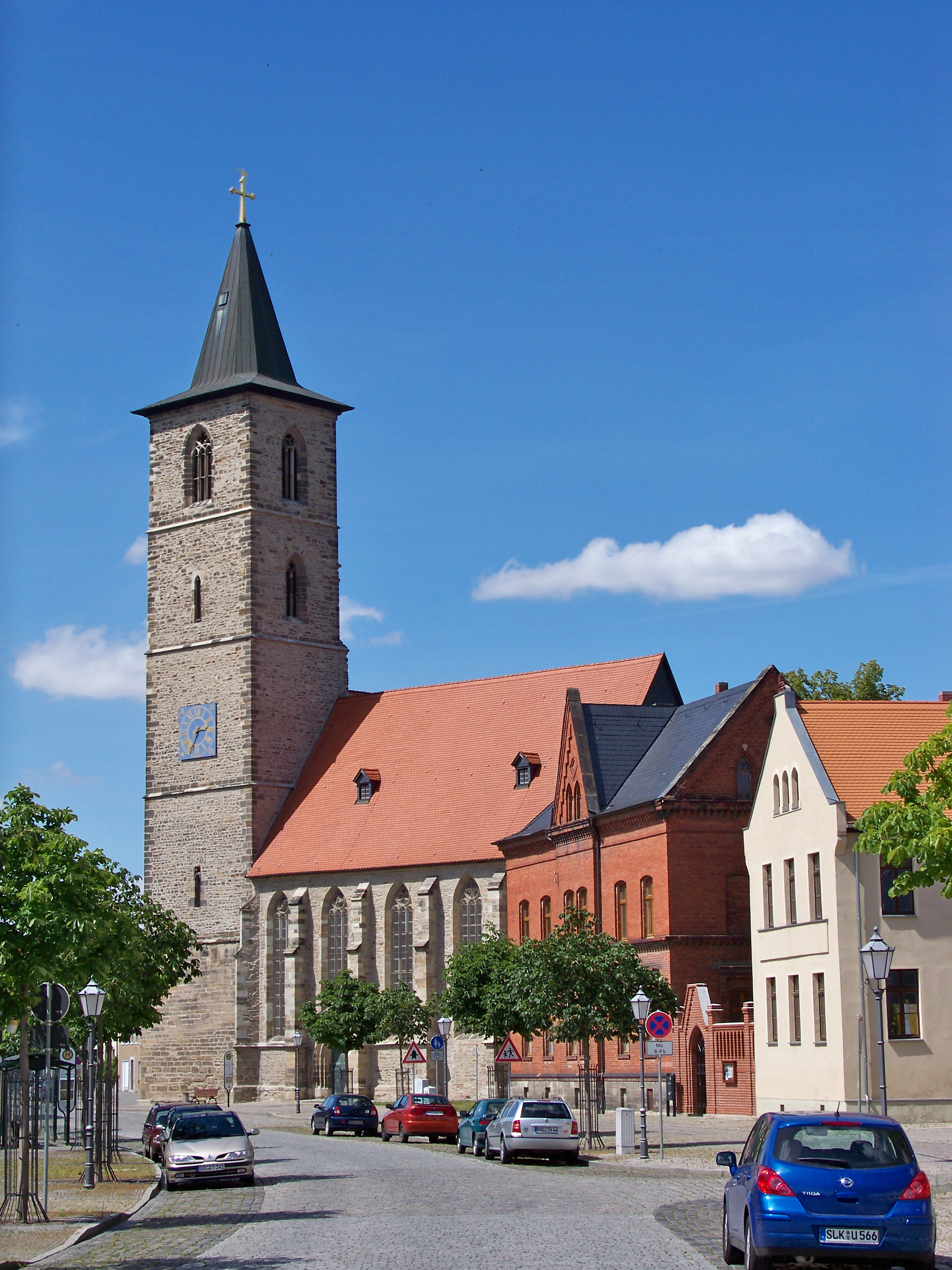 Kirche St. Nikolai in Bernburg (Saale)